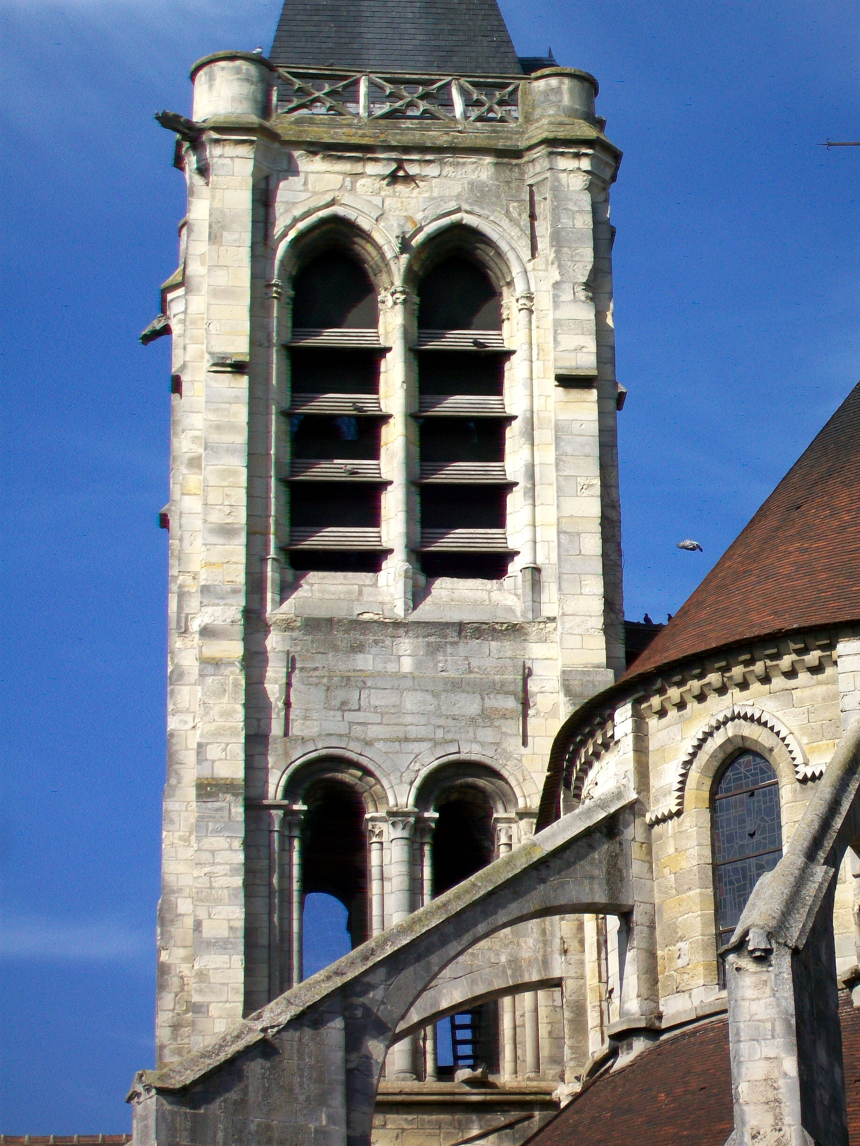 Vue rapprochée des deux étages supérieurs du clocher depuis l'est.